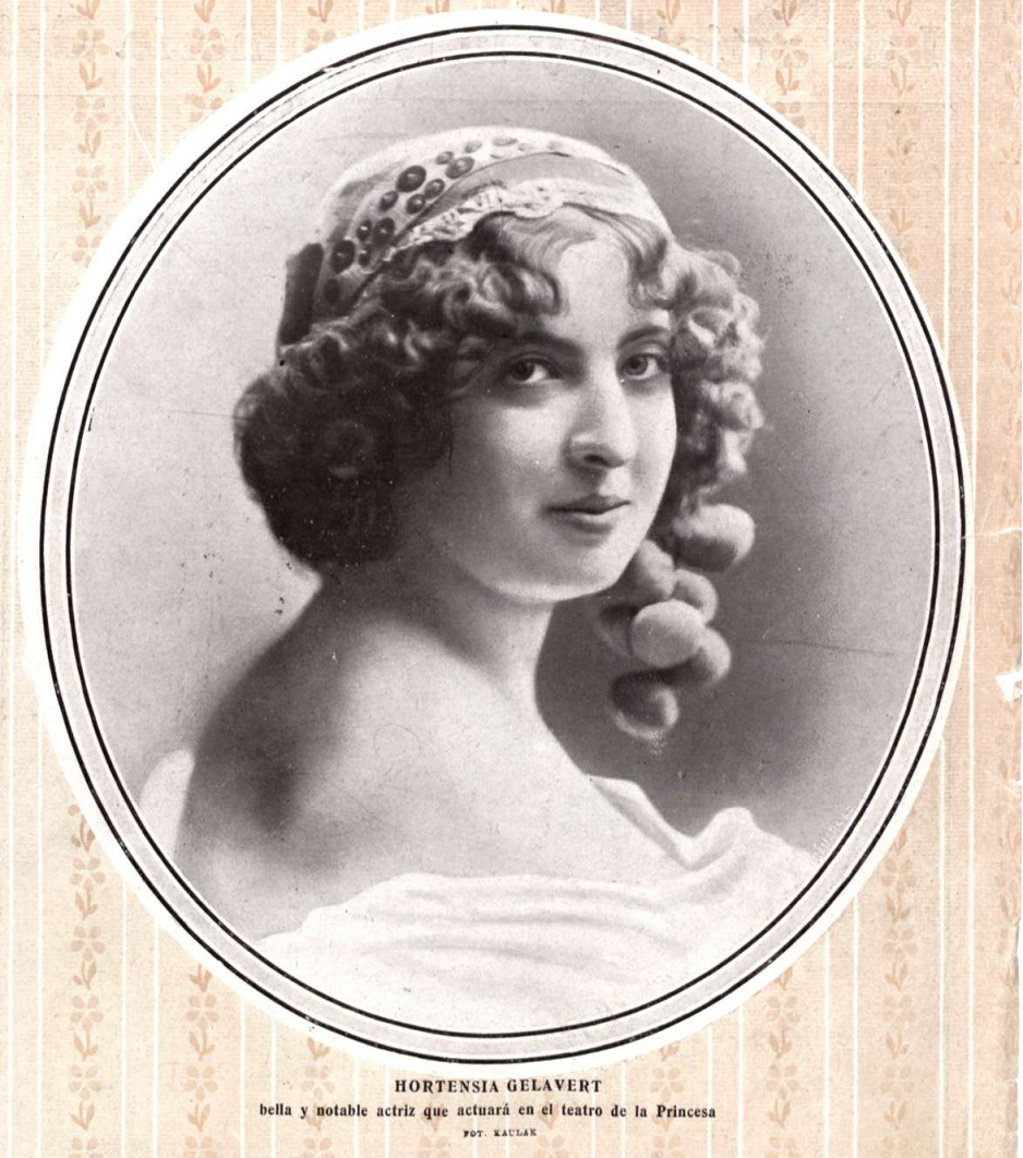 Retrato de Hortensia Gelabert, obra del fotógrafo Kaulak, recogido en la revista española Mundo gráfico.